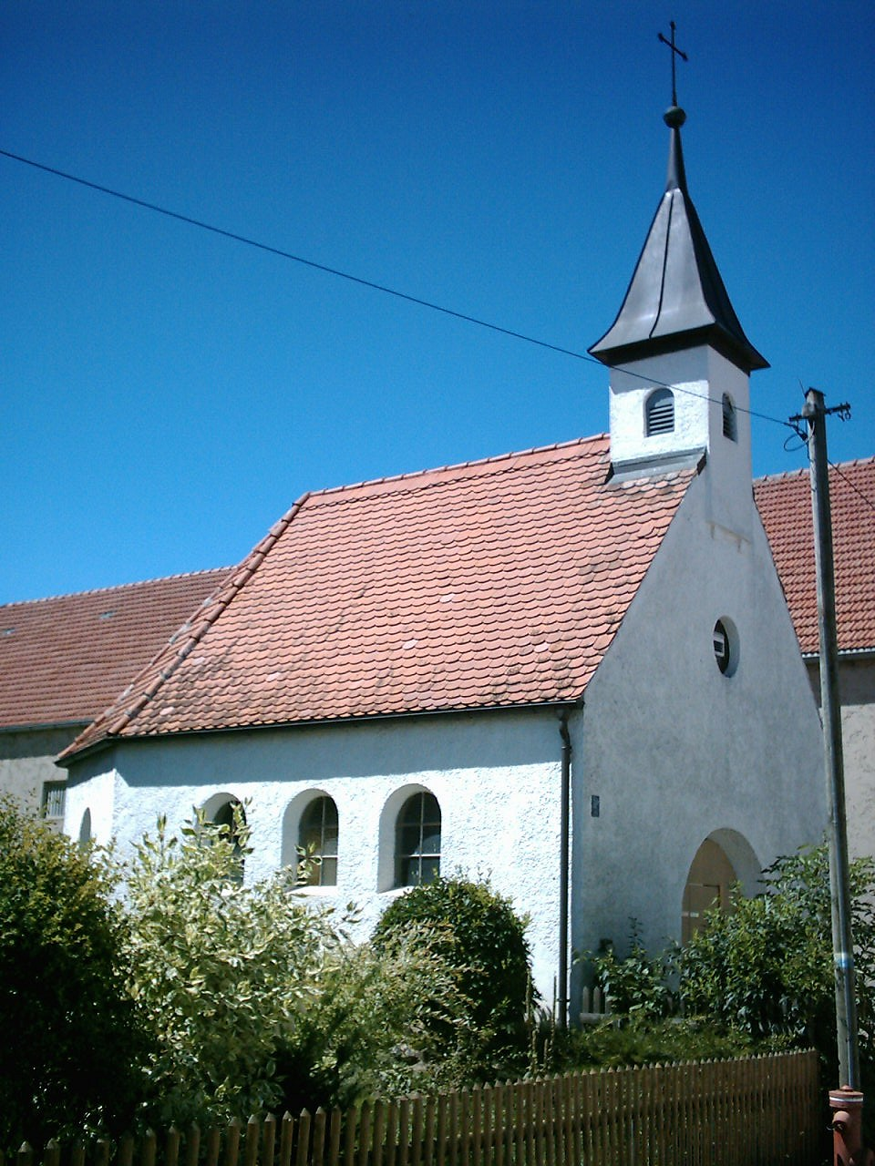 Kath. Marien-Kapelle in Bergen (Gemeinde Affing), 1953/54; mit Ausstattung; (Süd-Ost-Ansicht) Die Kapelle steht gegenüber der ehemaligen Dorfwirtschaft. Die damaligen Wirtsleute Theresia und Andreas Treffler ließen die Kapelle 1954 erbauen und lösten so ihr abgelegtes Gelübde ein, da ihnen ein gesundes Mädchen geboren wurde, welches sie (in der Kapelle?) auf den Namen Maria taufen ließen.